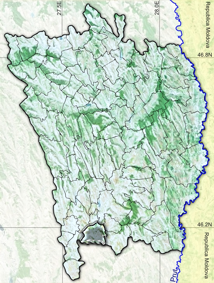 Grivita jud Vaslui.